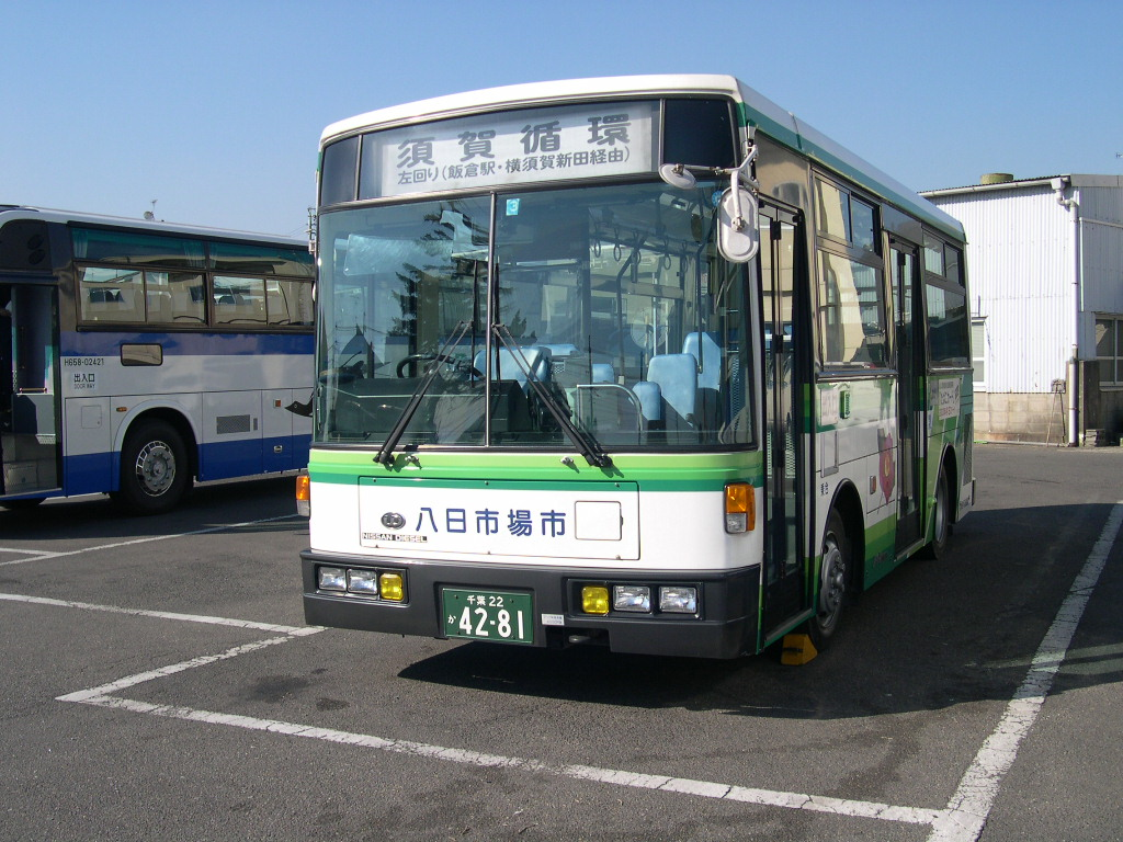 八日市場市（当時）循環バス 2003-1-12